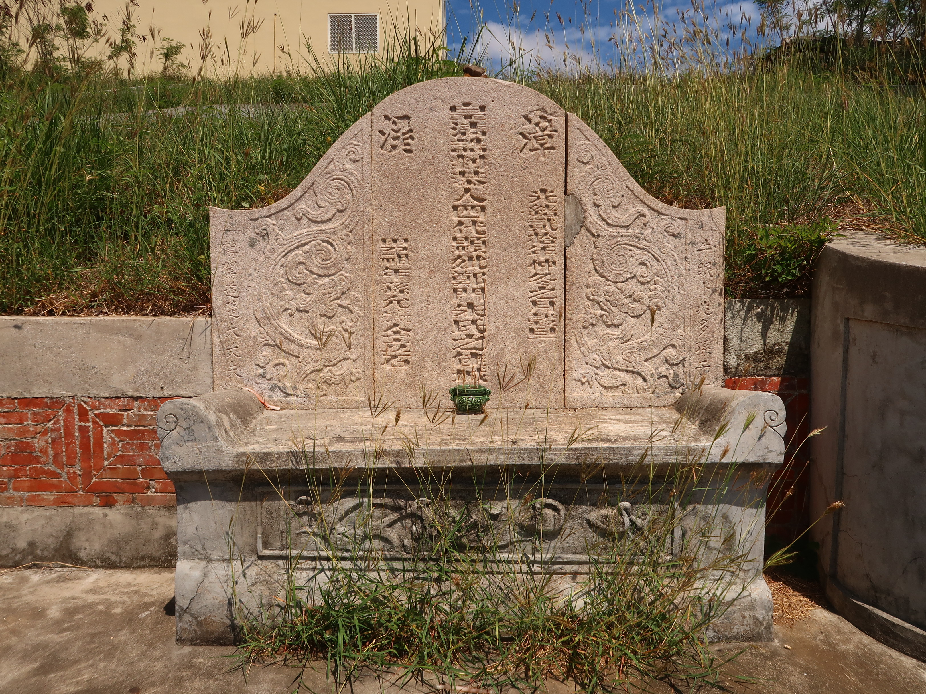 媽宮舉人鄭步蟾佳城